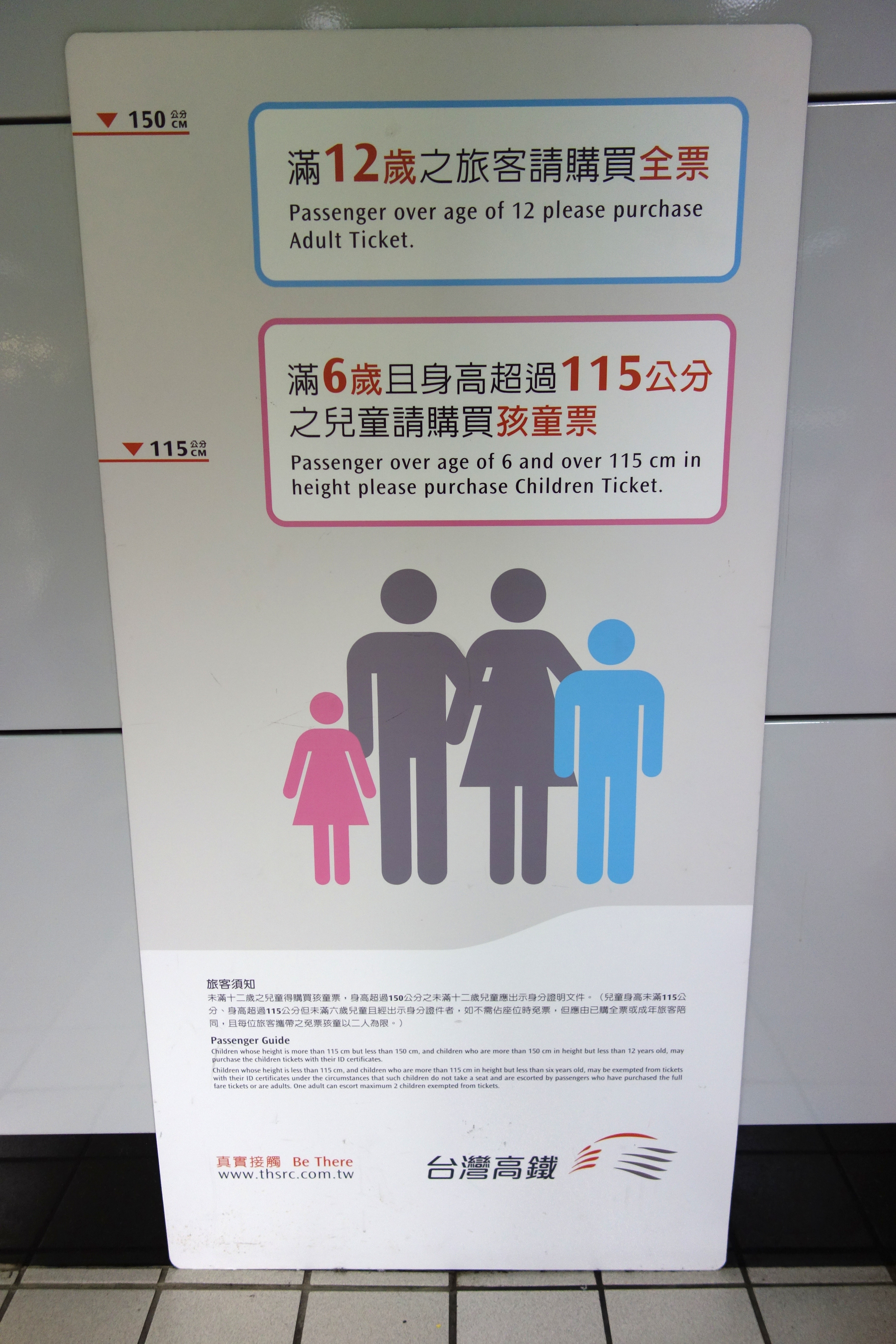 台湾高鐵台北駅 全票と孩童票のルール